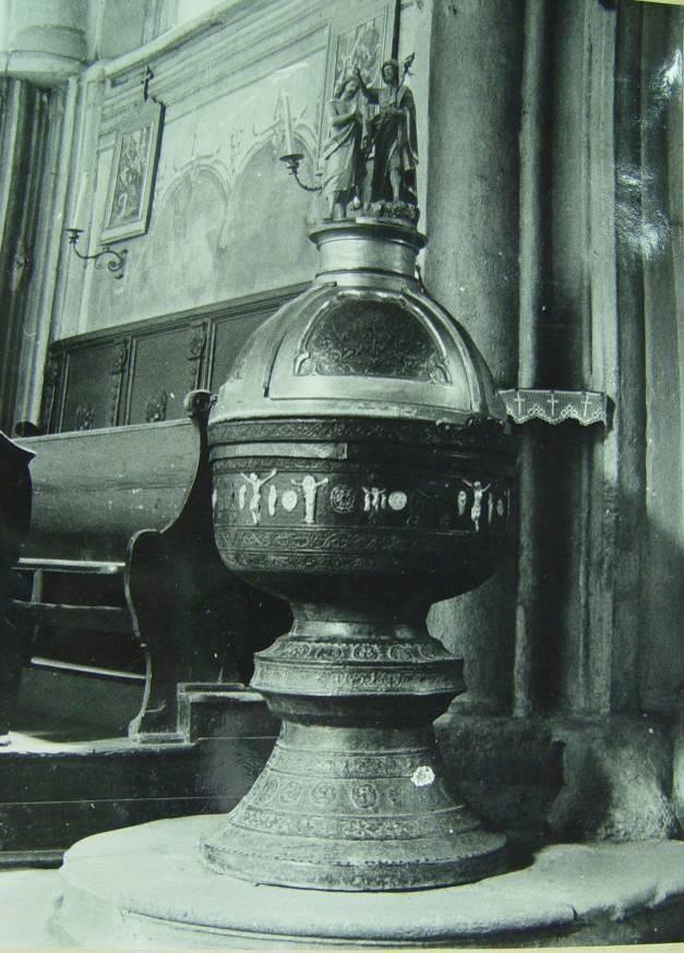 krstiteľnica z 15.storočia, používa sa doteraz